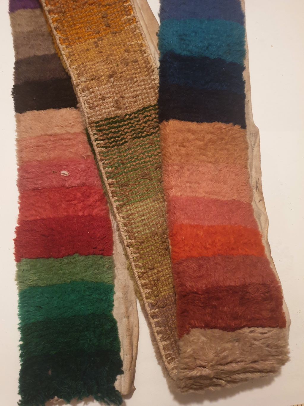 TFO Reproduction gamme couleurs. Coll. A. Tchouhadjian